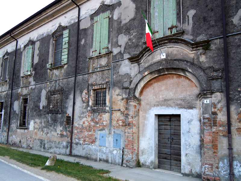 Casaloldo, frazione Molinello, Palazzo.